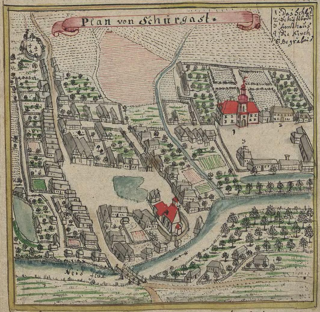 Plan von Schurgast in Oberschlesien. Zweite Hälfte des 18. Jahrhunderts. Zeichnung von Friedrich Bernhard Werner.